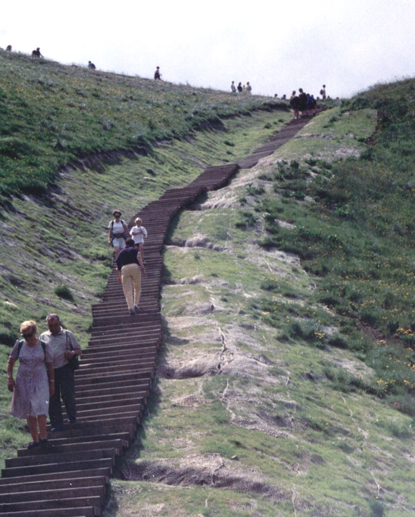 Eigen foto, gemaakt in 1995. Toont de eroderende werking van de constante stroom wandelaars op de Puy de Sancy in Frankrijk (Plateau Central). Voor de wandelaars is een houten trap aangelegd om de erosie te beperken